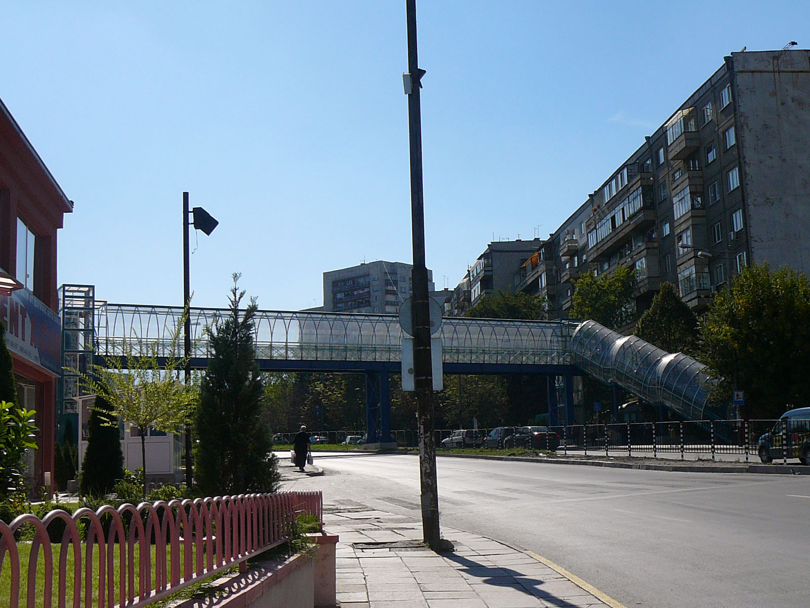 бул. Александър Малинов в жилищен комплекс "Младост 1", София